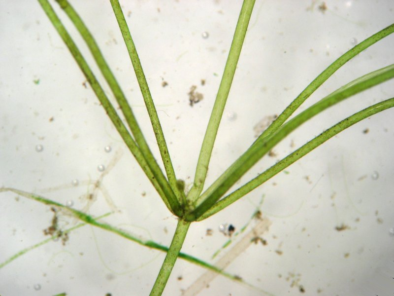 Stachelspitzige Glanzleuchteralge Nitella mucronata, Müritz-Gebiet